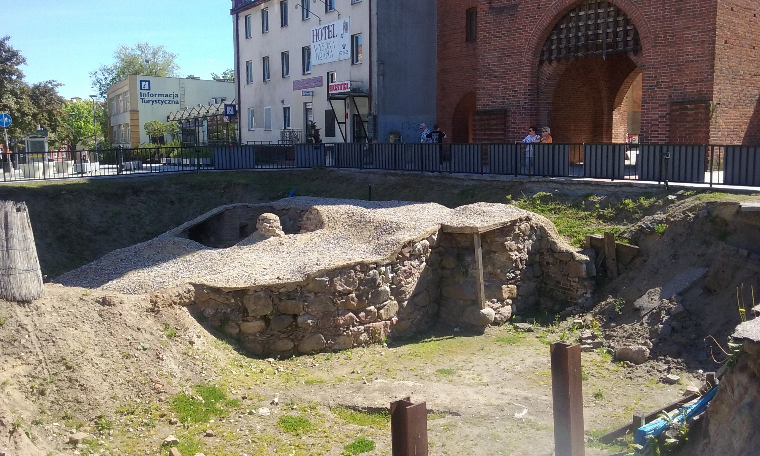 Wykopaliska archeologiczne przy Wysokiej Bramie w Olsztynie